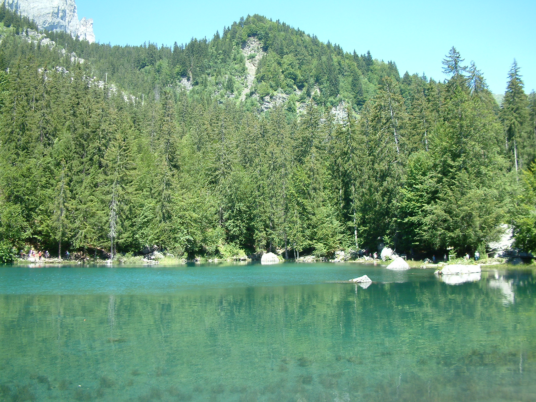 Lac Vert (Green lake), Passy, Haute-Savoie, France.